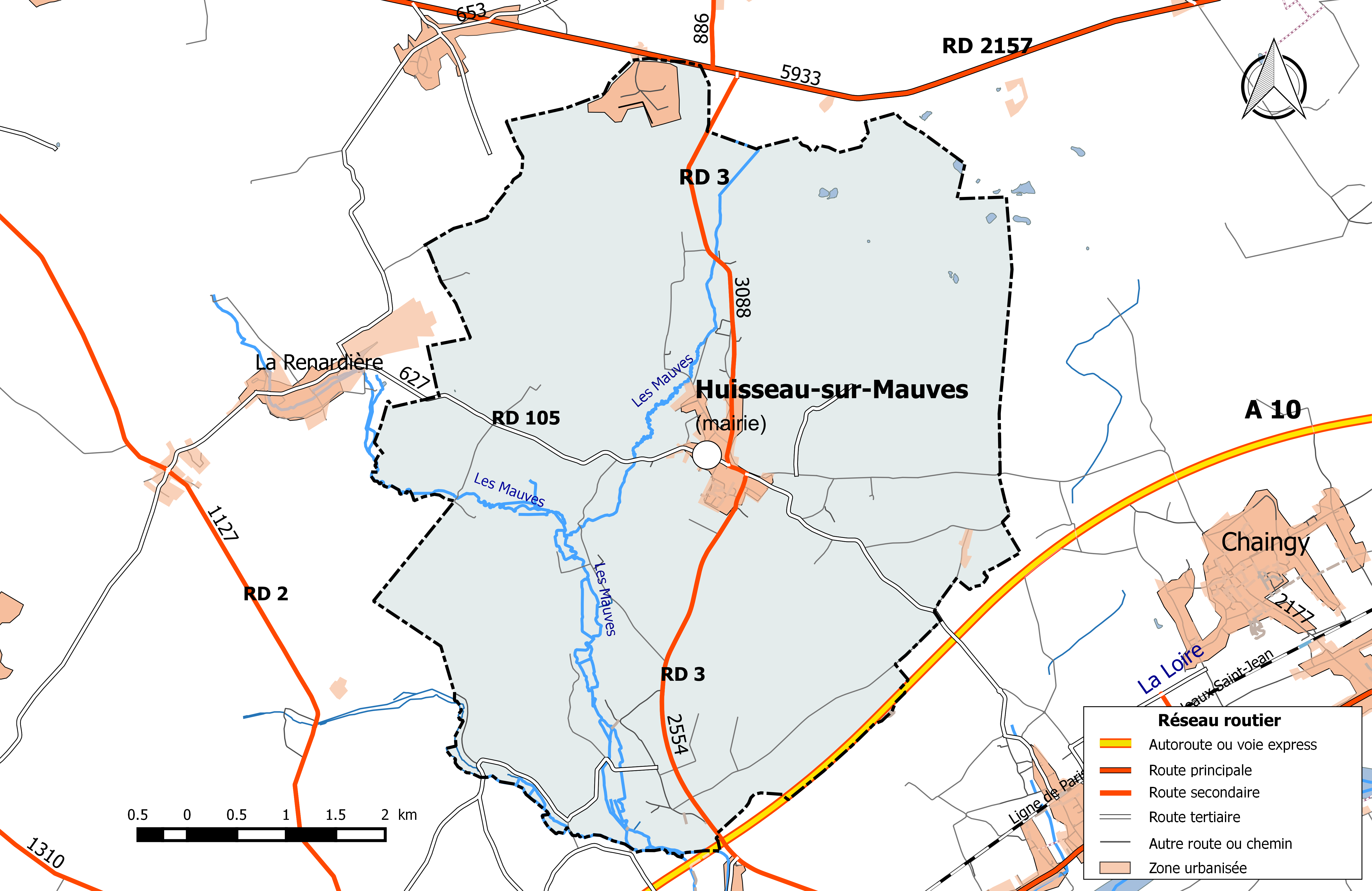 Carte du réseau routier de la commune de Huisseau-sur-Mauves.